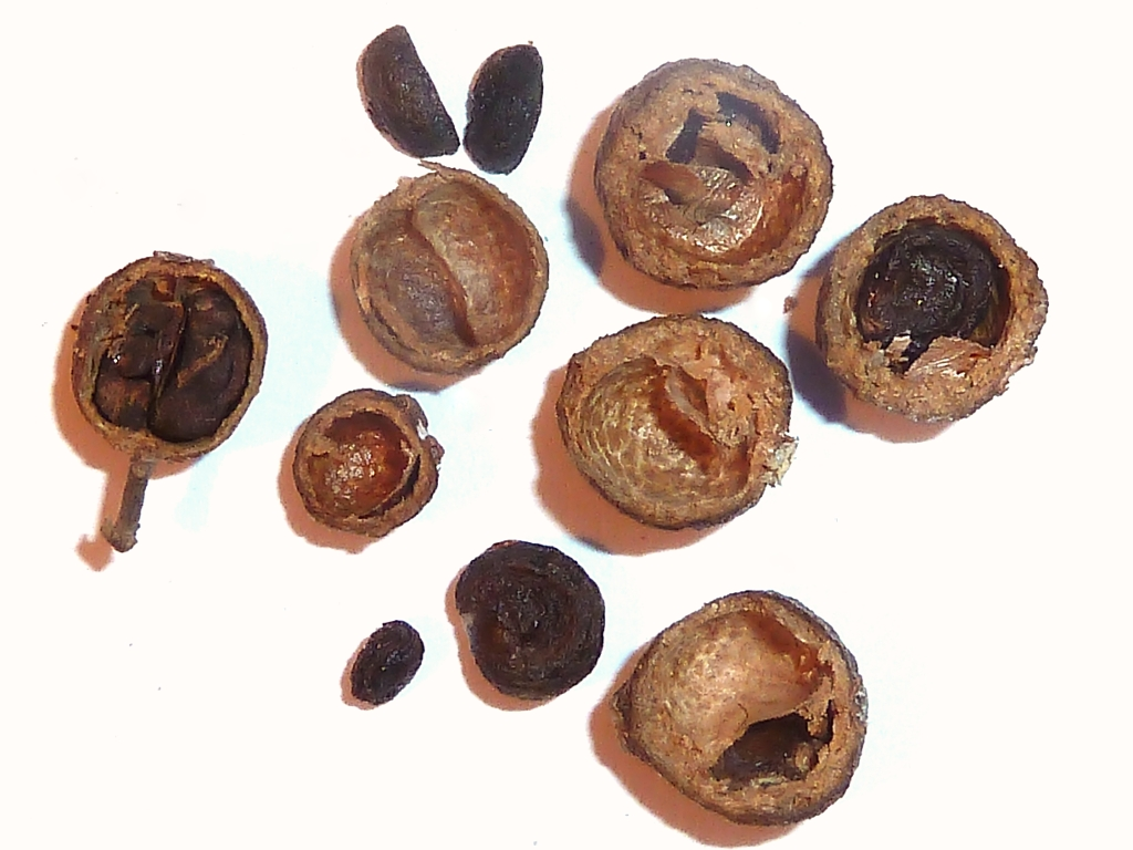 Pimienta racemosa (Malaguetta, bay-rum) . Granos secos (bayas) cortados transversalmente desde el ápice al pedúnculo, con semillas in situ y semillas sueltas. - Route de Clairière, Fort-de-France (Martinica, Caribe francés).